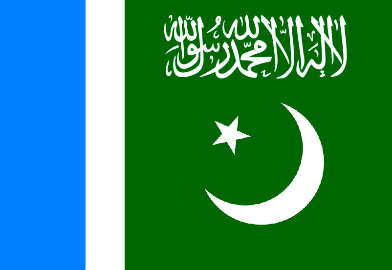 Jamaat-e-Islami Pakistan flag